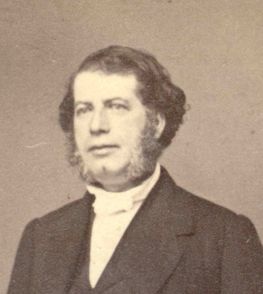 Photo du goguettier parisien Adolphe Letac. Il fut limonadier, huissier, et a la fin de sa carrière, gérant du passage Vérot Dodat. Document communiqué par son arrière arrière petit-fils Jean-Luc Letac.